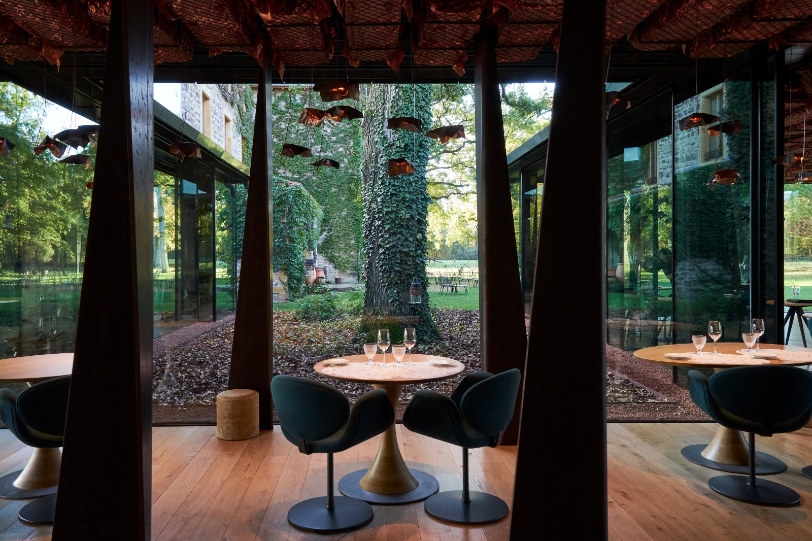 Le bois sans feuilles